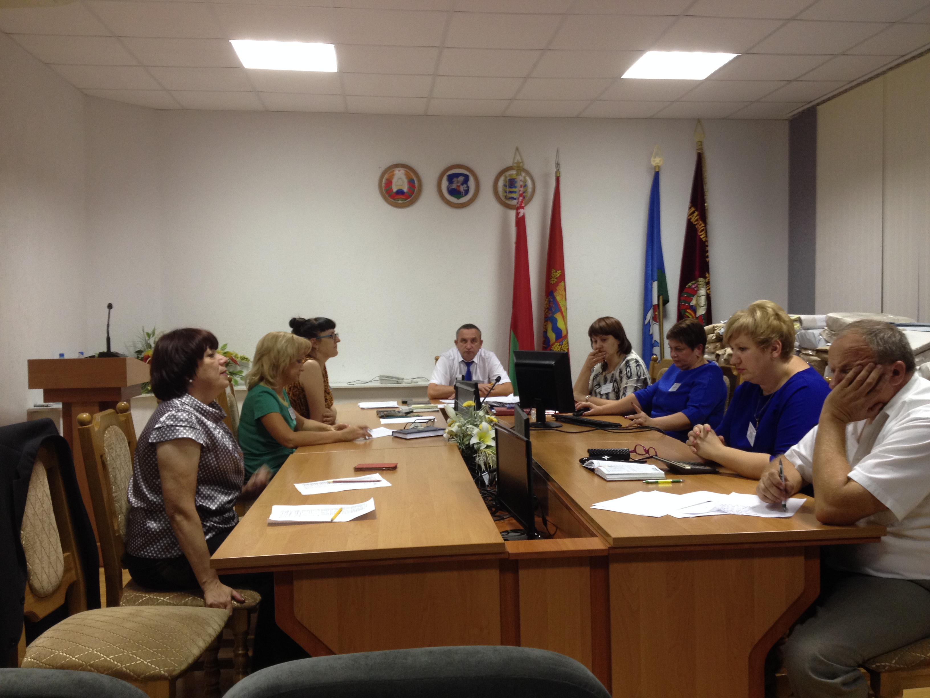 Wybory parlamentarne na Białorusi, 2017